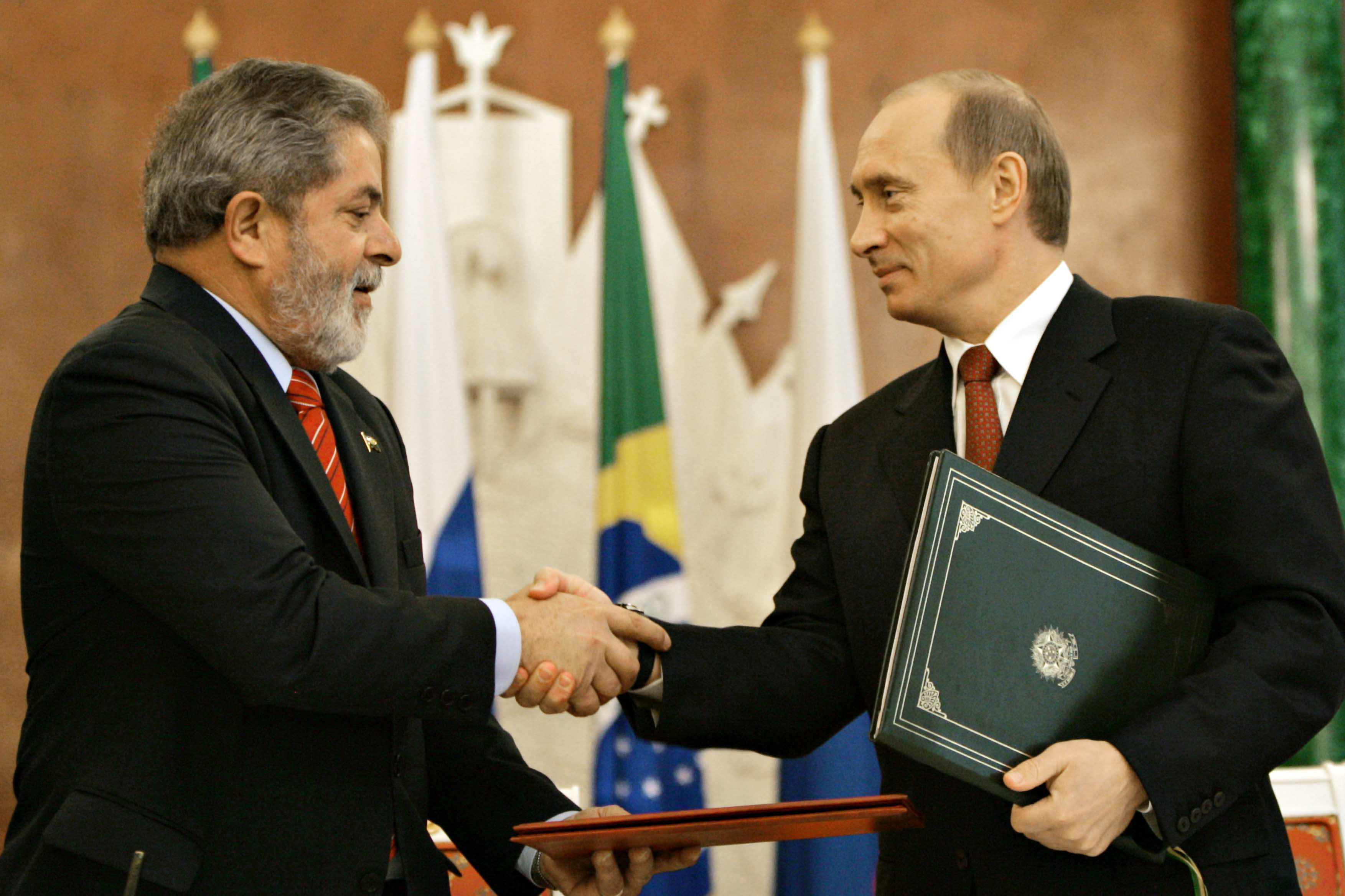 The presidents of Brazil, Luís Inácio Lula da Silva, and Russia, Vladimir Putin during a meeting in Moscow.